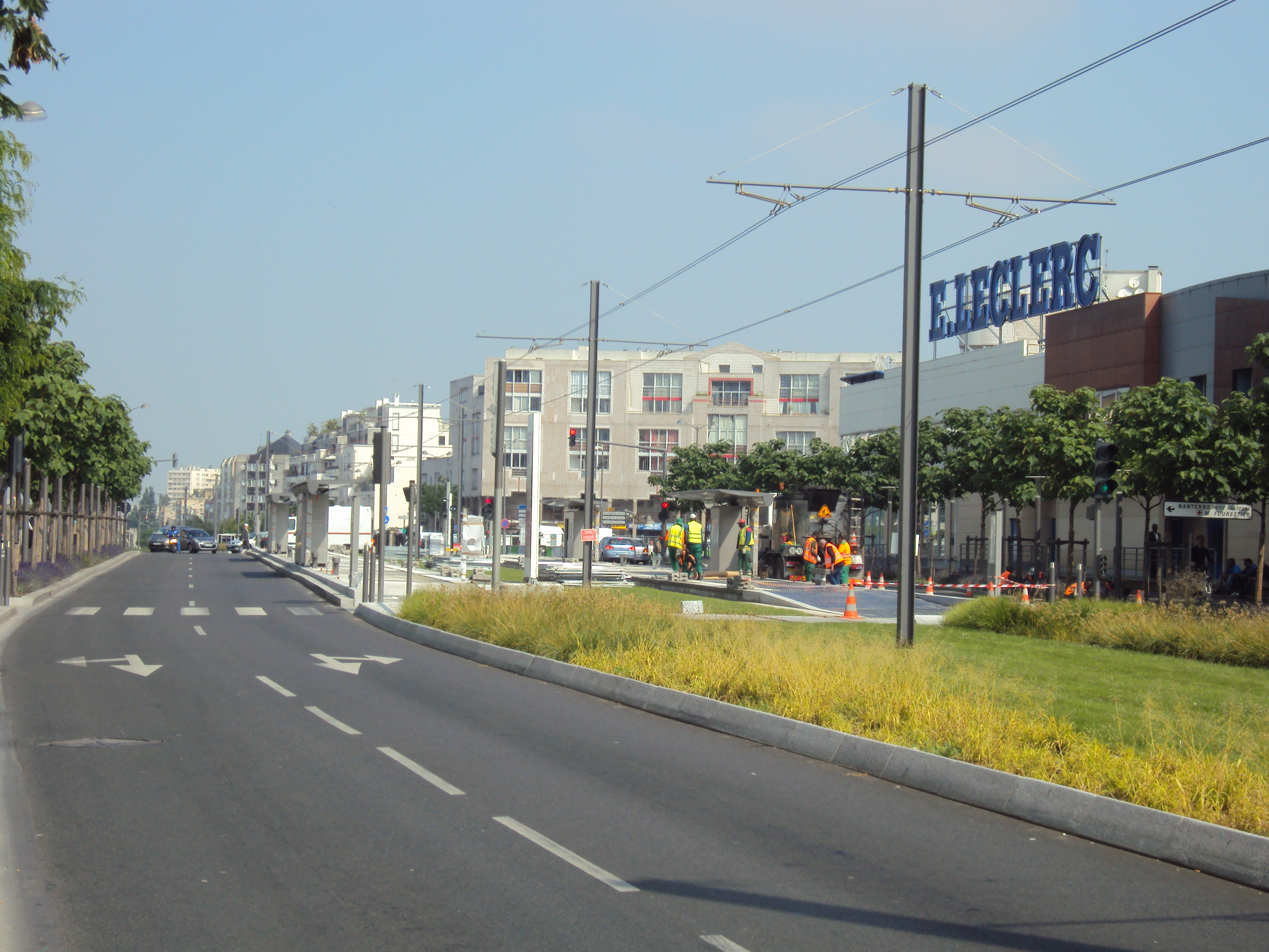 Chantier du T2 à colombes station Victor Basch